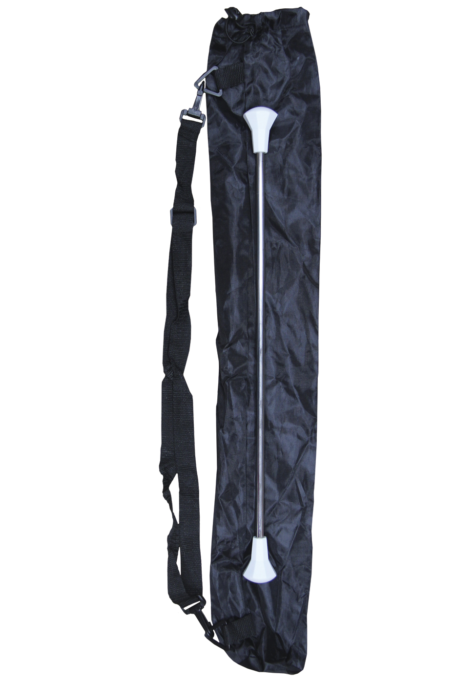 Чехол для переноски батона